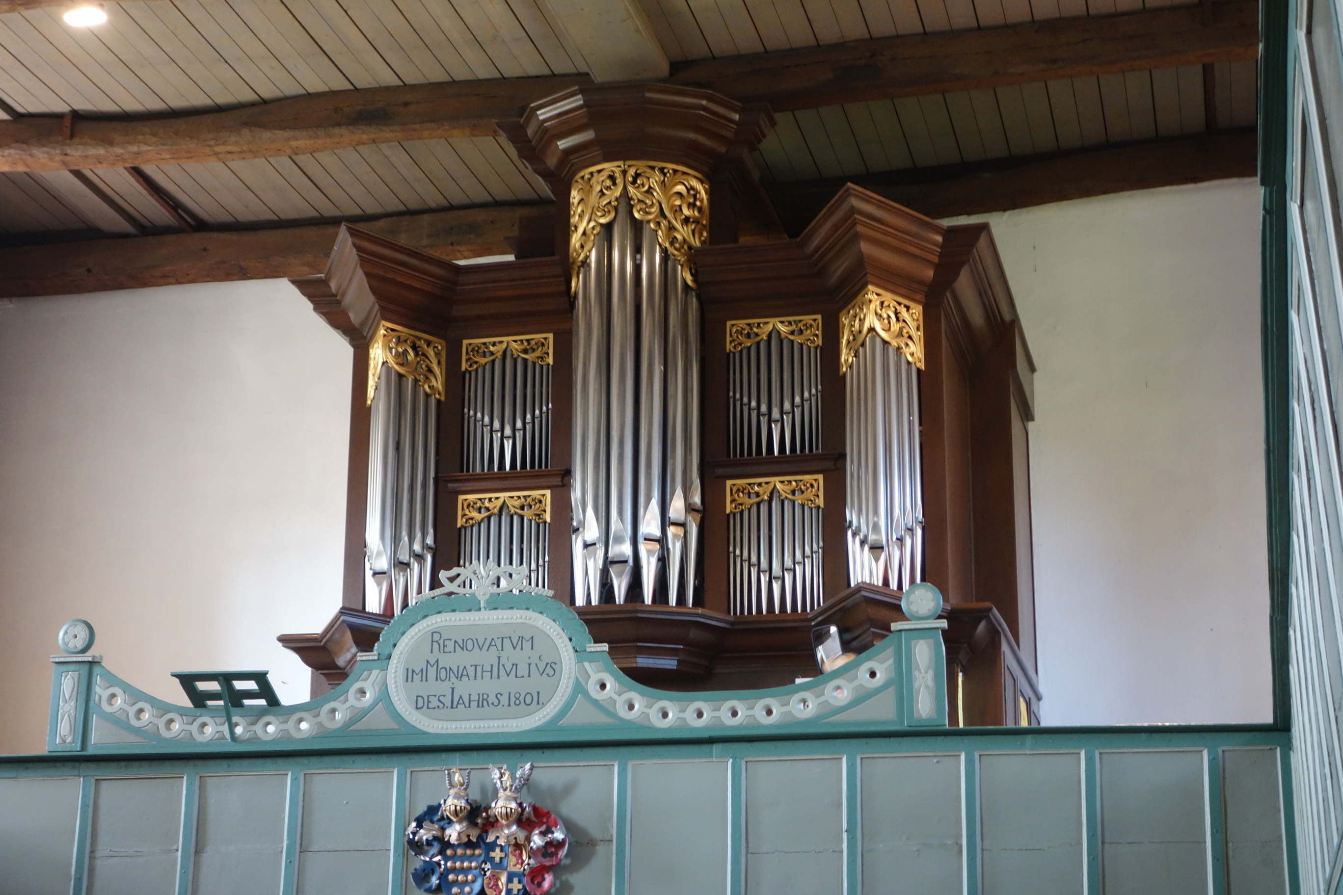 Orgel von St. Marien Gudow, Kreis Herzogtum Lauenburg, Schleswig-Holstein, Deutschland